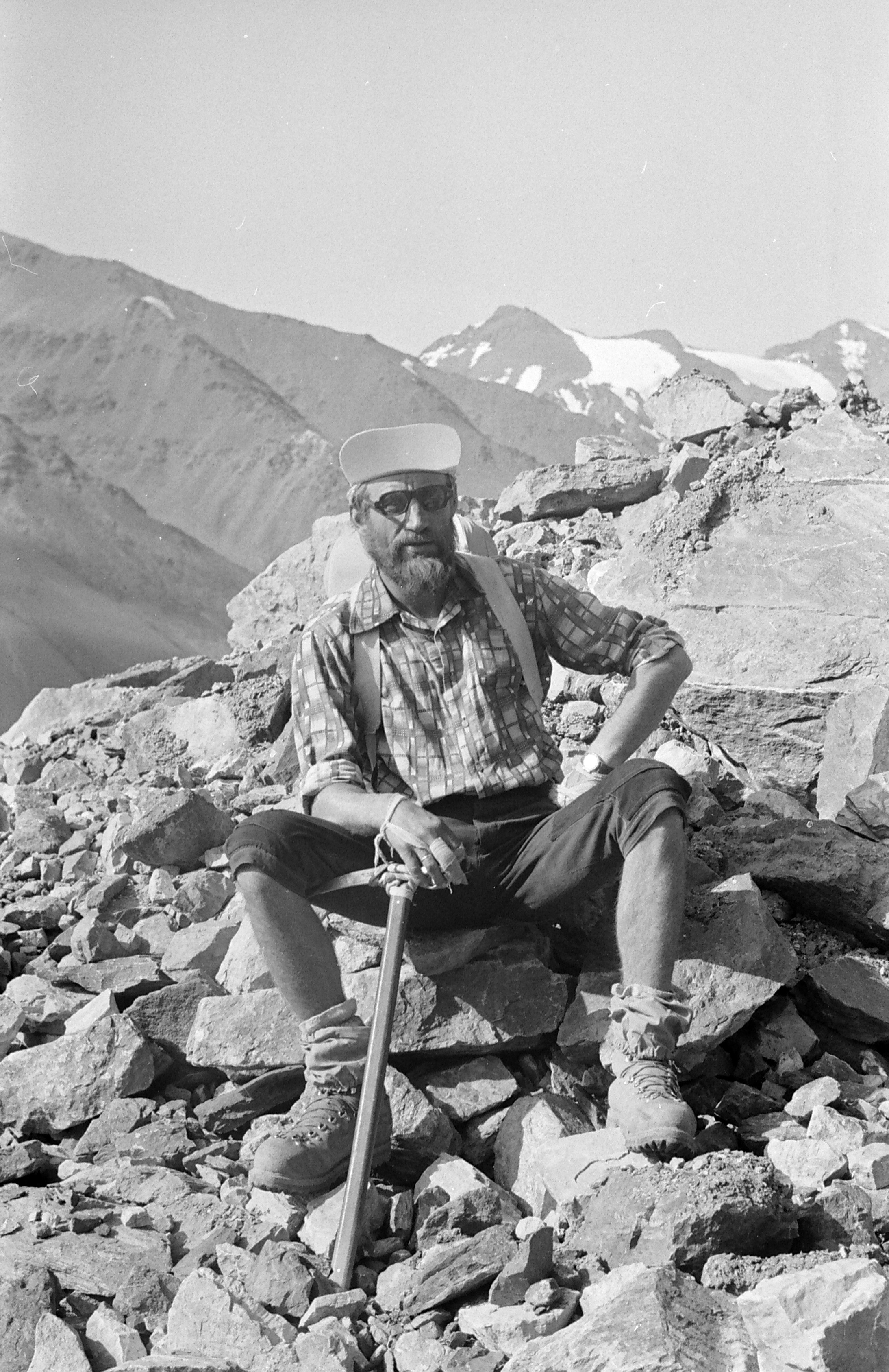 Ekspeditsioon mäetipule "Tartu Ülikool 350". Jaak Sumeri.